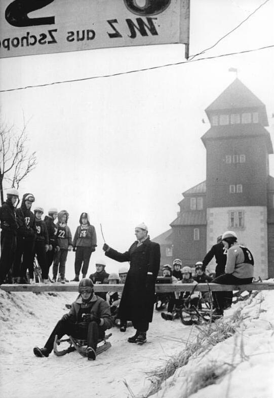 Fichtelbergrennen, Rodeln, Start Zentralbild Gahlbeck Tr 7.1.1962 DDR-Elite am Start-Am 6. und 7.1.1962 eröffneten die Rennschlittensportler aus allen Bezirken der DDR mit dem Fichtelbergrennen die Saison. Die schneesichere Bahn am Fichtelberg ist 1 600 m lang und der Start befindet sich auf der Spitze des Fichtelberges. Zum Auftakt der Saison waren über 100 Rennrodler am Start. UBz: Am Start auf dem Fichtelberg. Im Hintergrund das Fichtelberghaus.